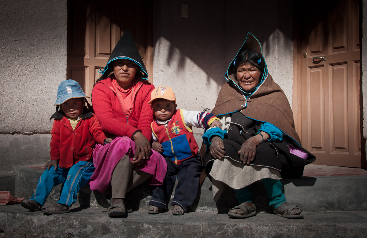 Esta foto se tomó el 4 de octubre, 2011 en Chipaya, Oruro, Bolivia, con una Nikon D90.